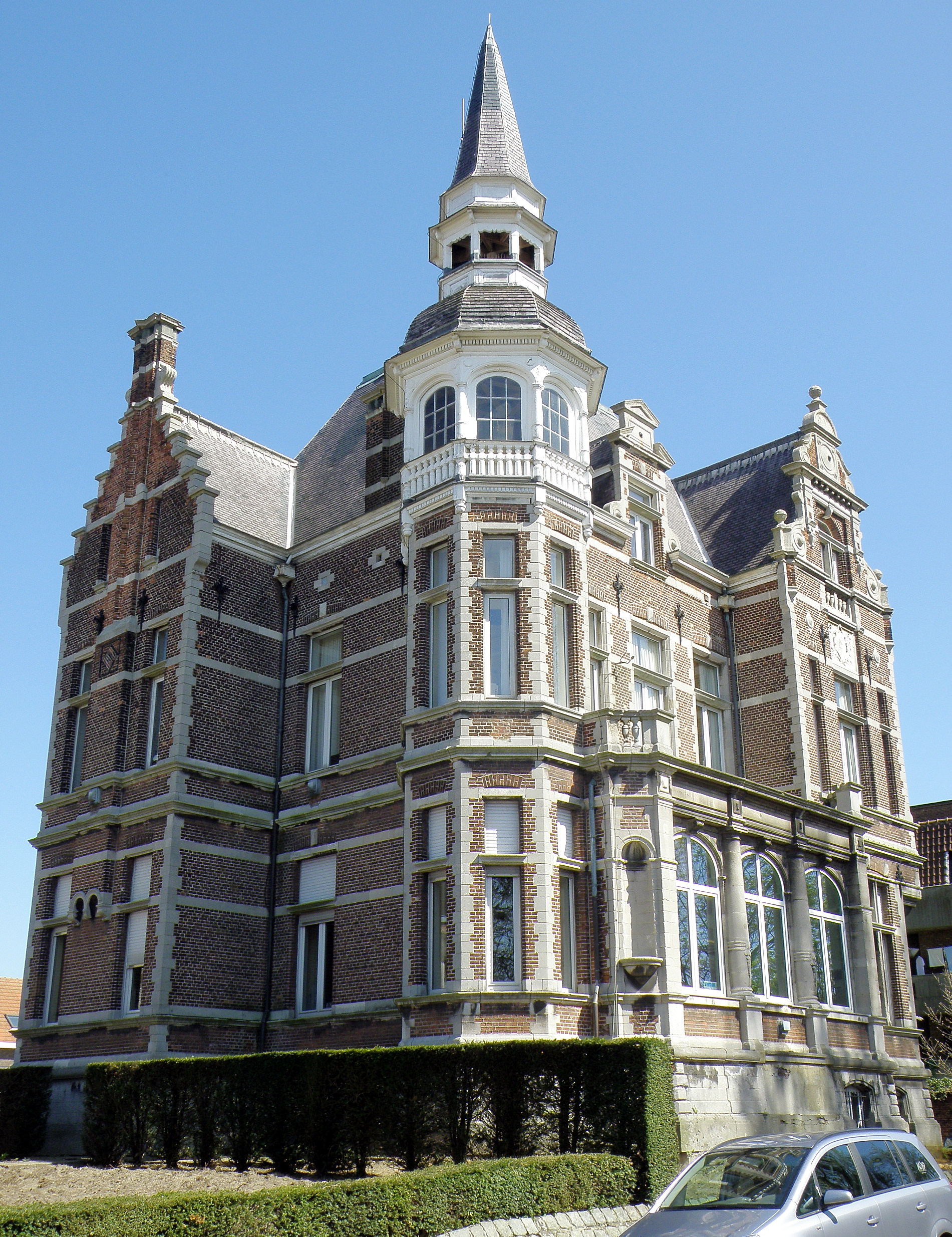 Antwerpen, district Ekeren. Hof Mertens, ofte Gulden Poort, nabij kerk. Ontwerp van Henri Blomme (1884). Vgl. voorts Inventaris Bouwkundig Erfgoed Vlaanderen.